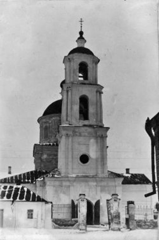 Дзвінниця Хрестовоздвиженської церкви у м. Старий Оскол. Храм споруджено у 1805 році у слободі Ямська (нині район міста Старий Оскол).